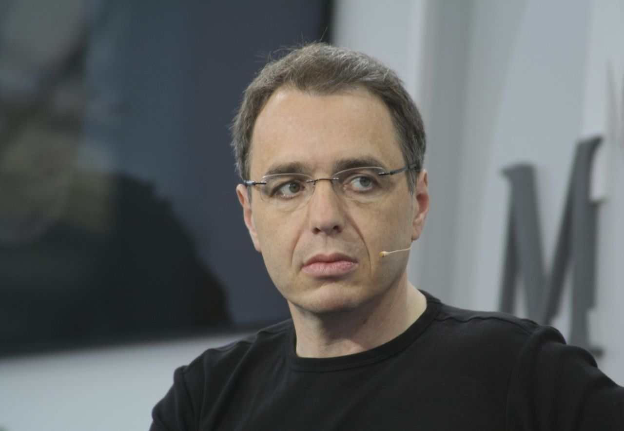 David Safier auf der Leipziger Buchmesse 2014 bei der Vorstellung seines Romans "28 Tage lang"